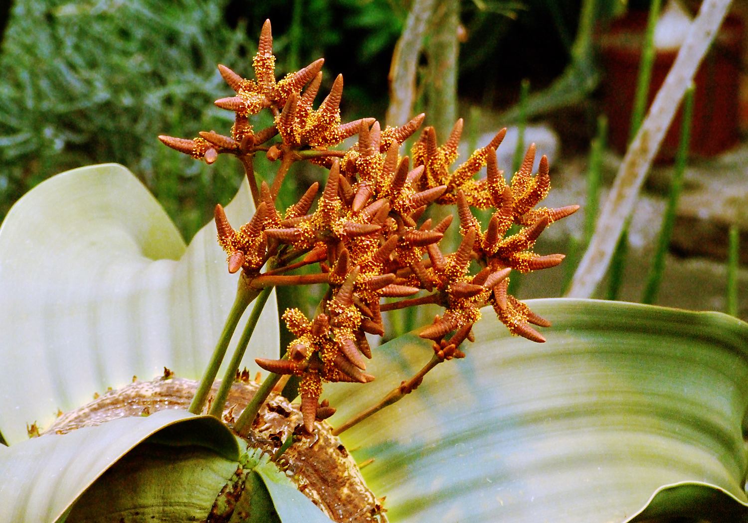 Ogród Botaniczny w Poznaniu, welwiczia przedziwna, (kwiatostan rośliny rodzaju męskiego); Botanical garden in Poznań, Welwitschia mirabilis (male with inflorescence)